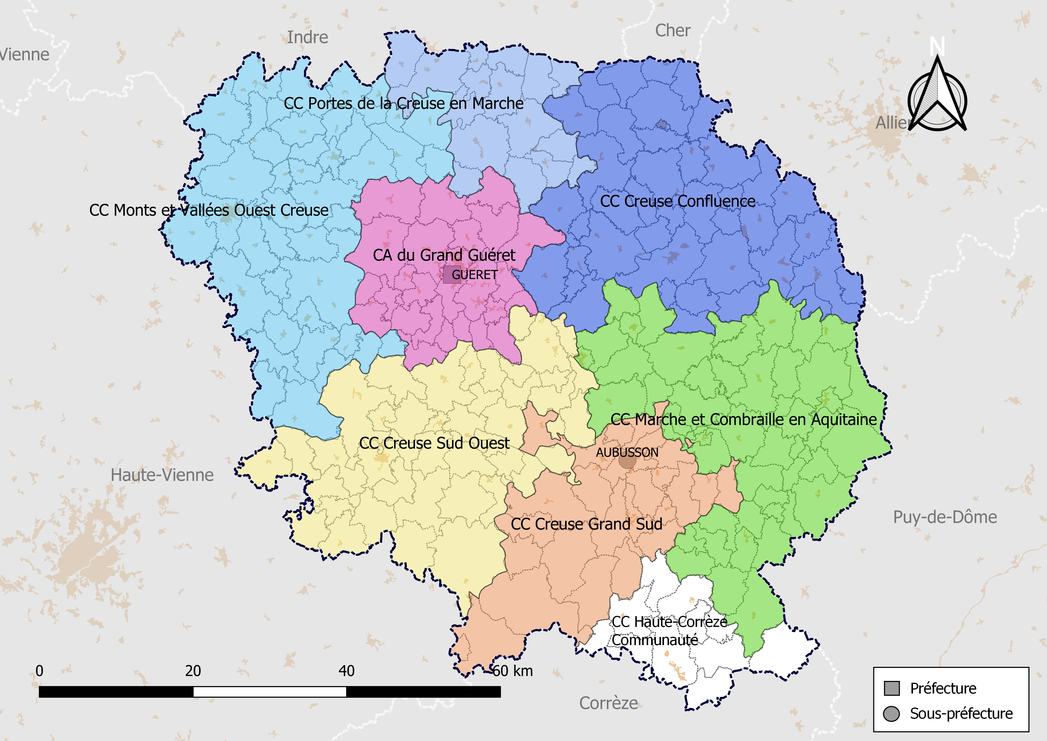 Carte des intercommunalités du département de la Creuse, France. Composition au 1er janvier 2019.